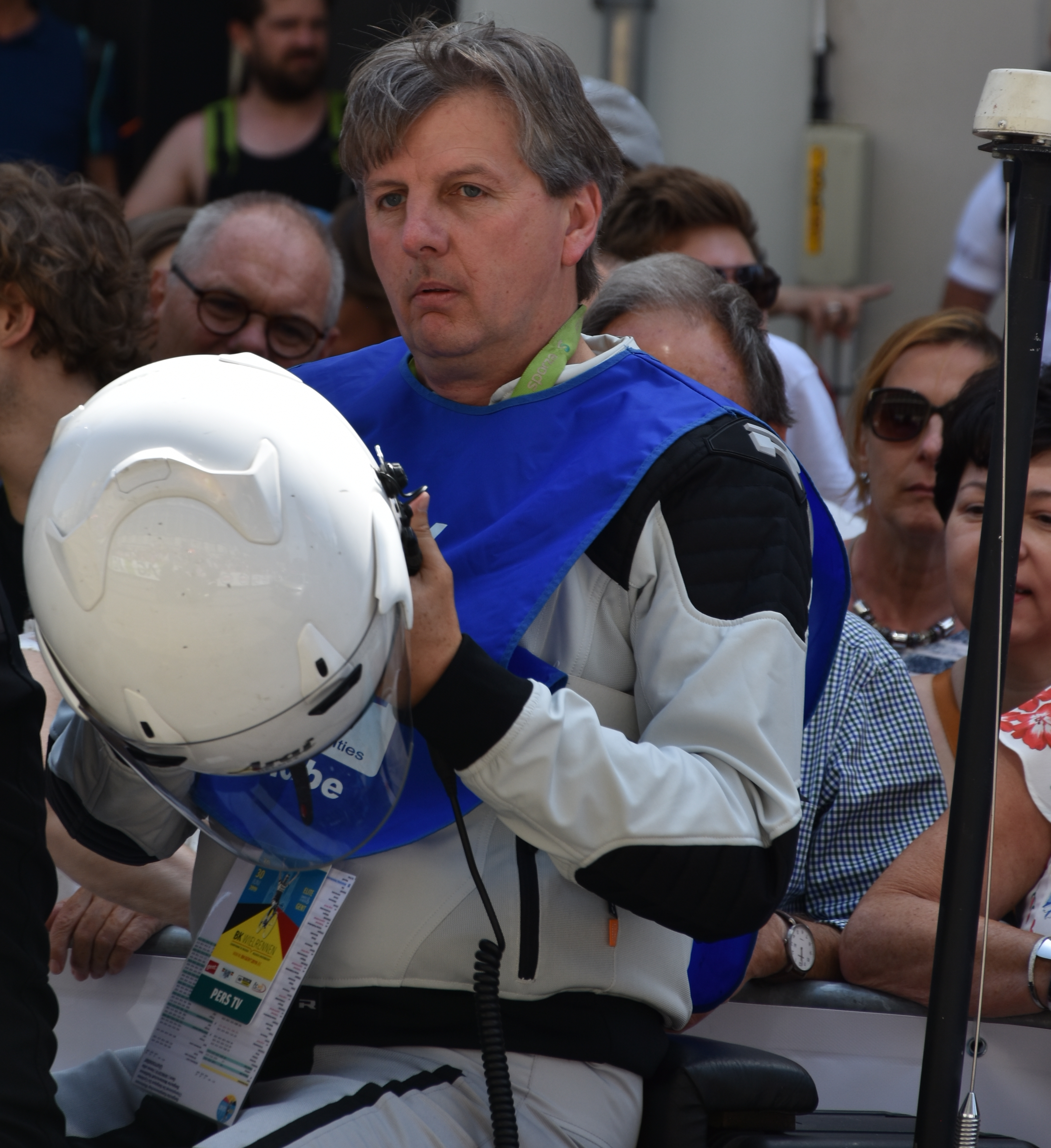 Renaat Schotte BK wielrennen Gent 30-06-2019 11-57-22